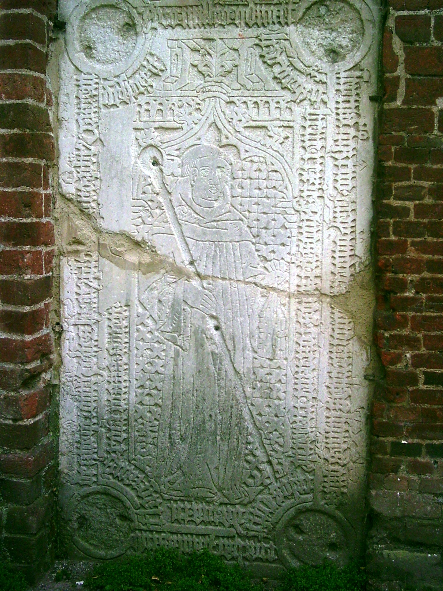 Grabplatte im Kloster Eldena von Abt Johannes VII. († 1473 Mai 11) Eine Beschreibung und Abbildung der Grabplatte findet sich in: Theodor Pyl: Geschichte des Cistertienserklosters Eldena im Zusammenhange mit der stadt und Universität Greifswald. Band 1, Greifswald: Gesellschaft für pommersche Geschichte und Altertumskunde. Rügisch-pommersche Abteilung in Stralsund und Greifswald 1880 des Exemplars der University of Michigan, ex Lehrerbücherei Rostock'), S. 125ff.